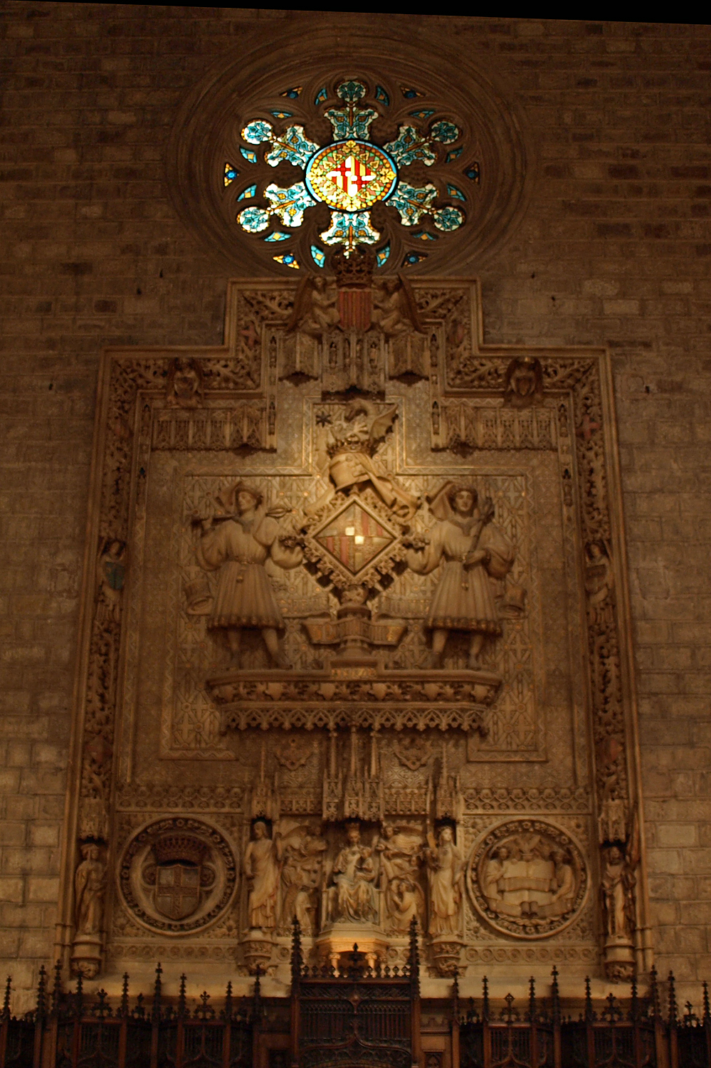 Saló de Cent (Ajuntament de Barcelona)